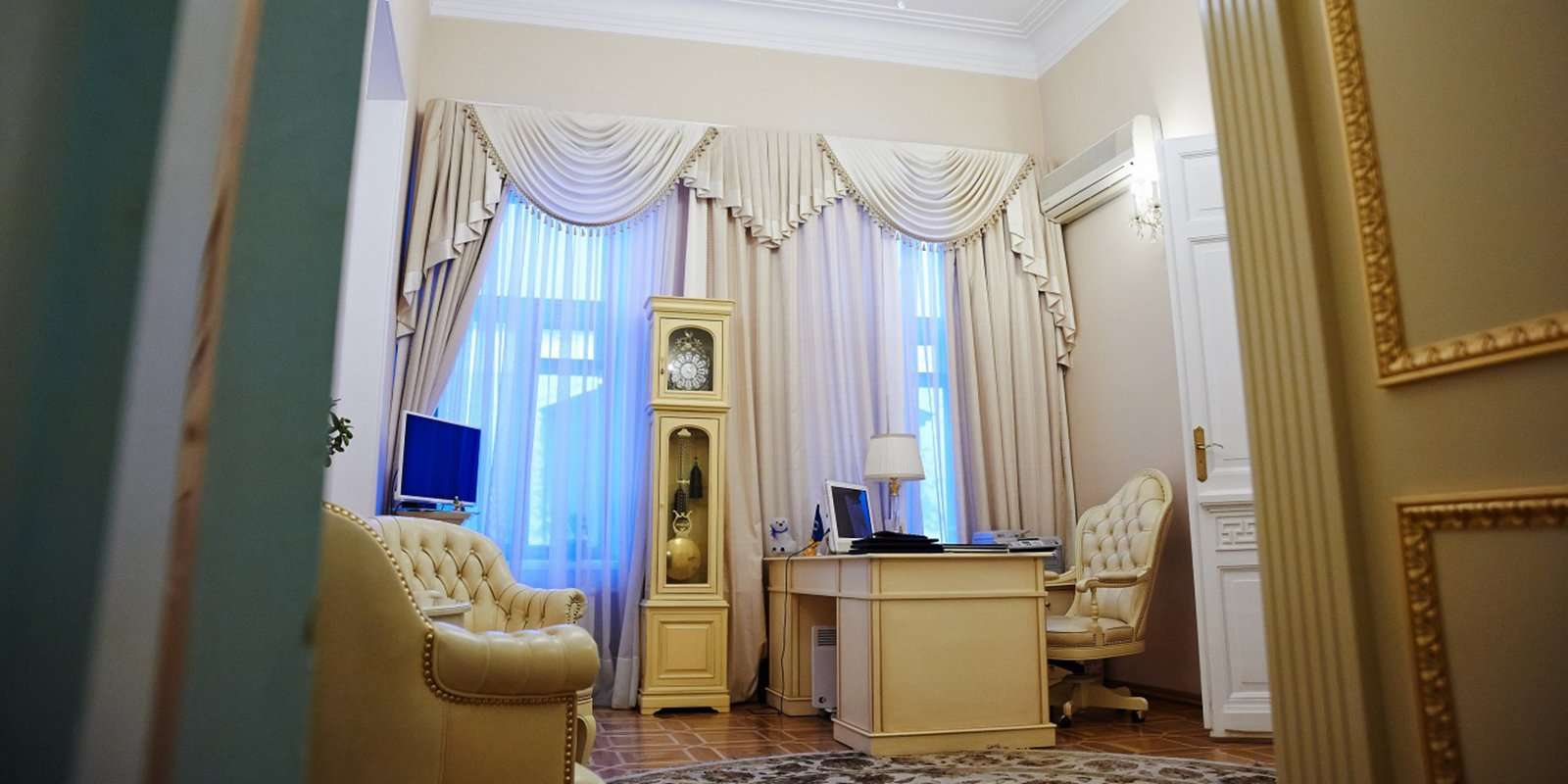 Интерьер главного особняка московской городской усадьбы Прохоровых-Хлудовых в Подсосенском переулке, 30. Вид на белый зал второго этажа с парадной лестницы